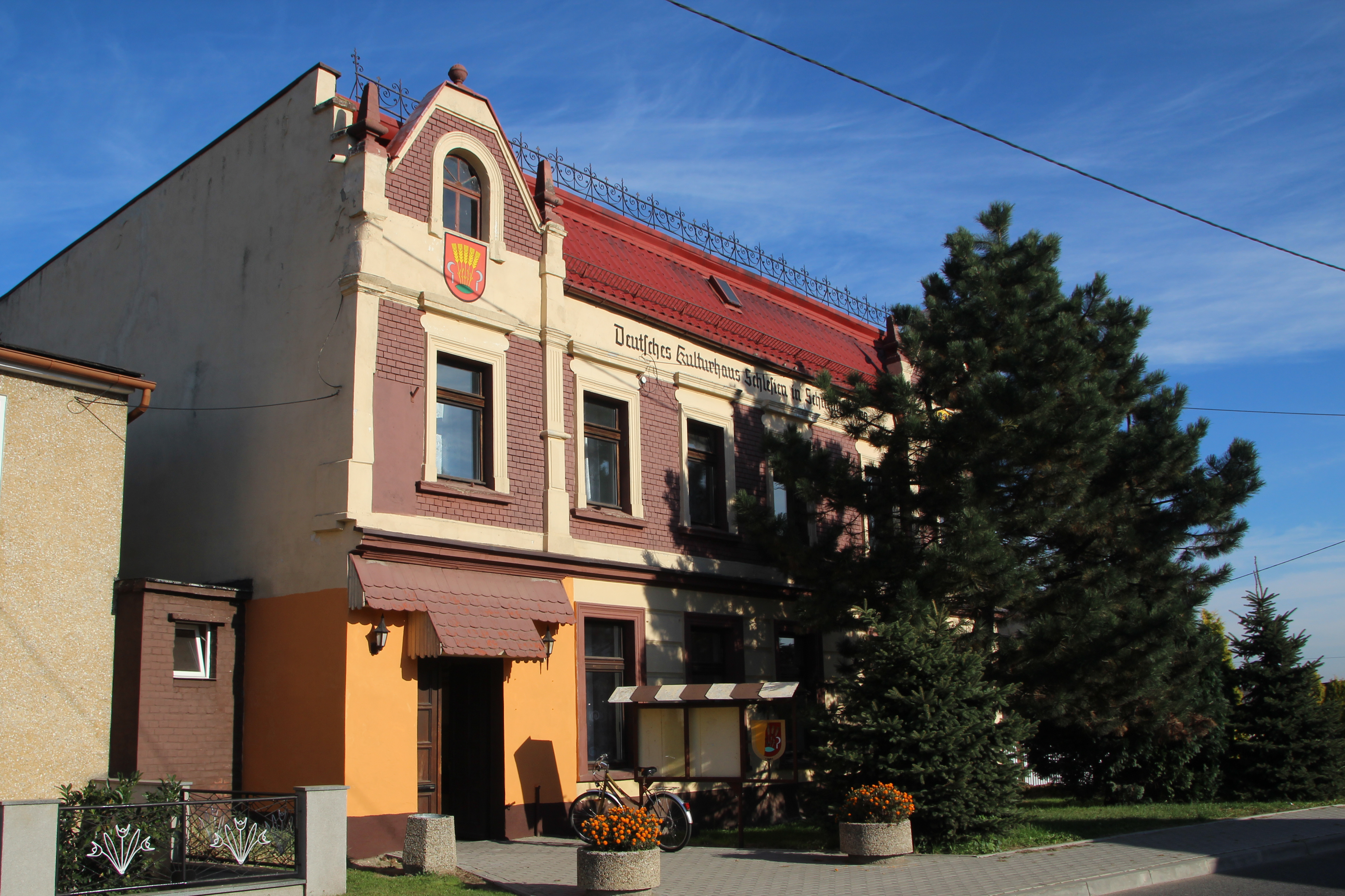 Ostrożnica (w j. niem. Ostrosnitz) – wieś w Polsce położona w województwie opolskim, w powiecie kędzierzyńsko-kozielskim, w gminie Pawłowiczki.